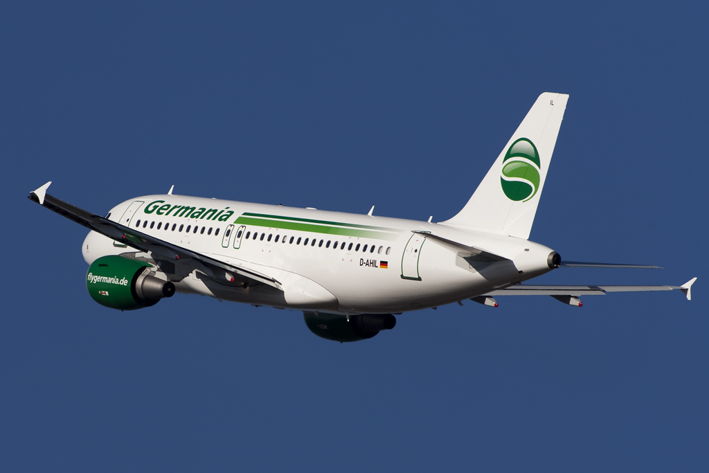 Dusseldorf